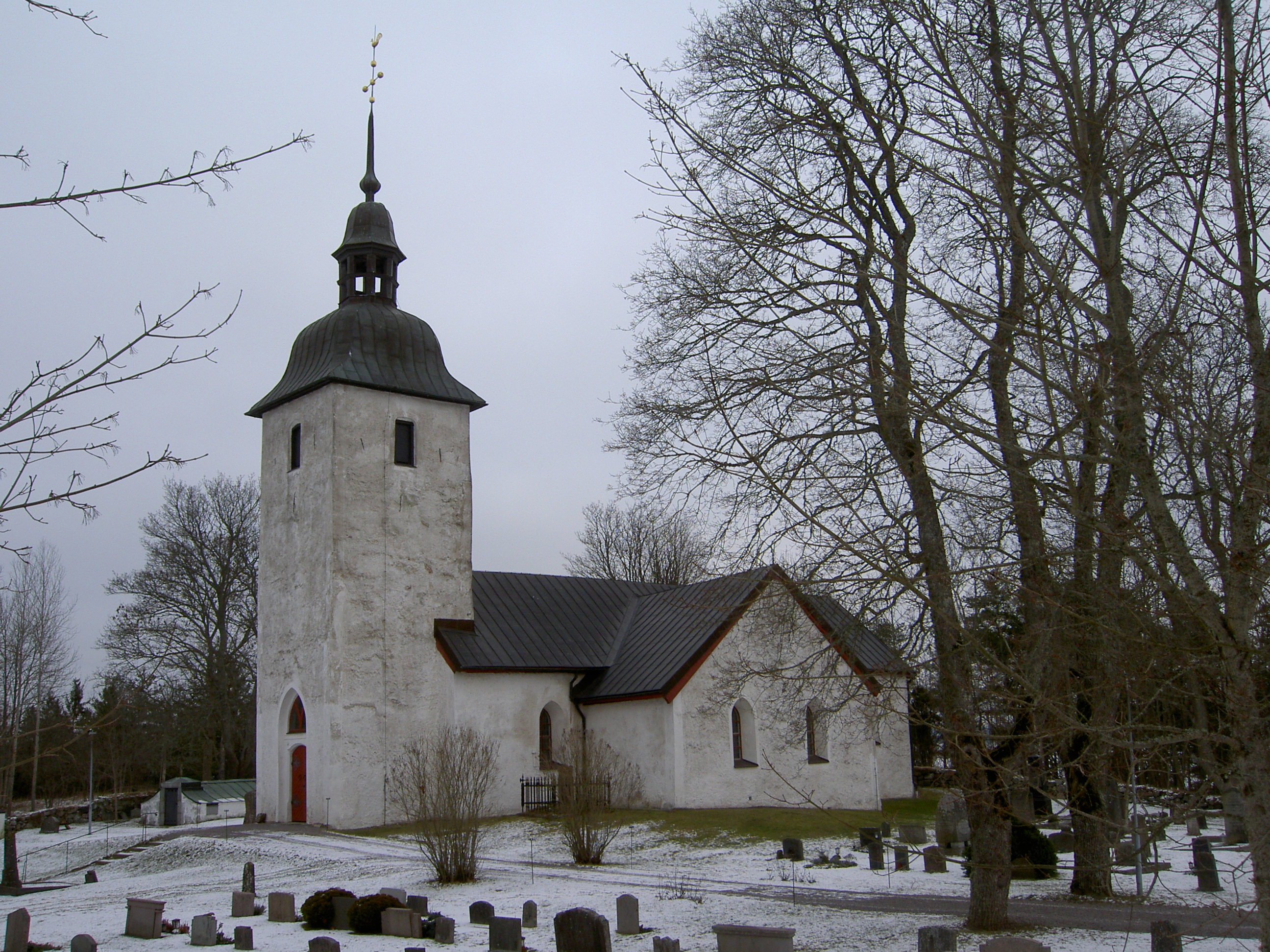 Ytterjärna kyrka